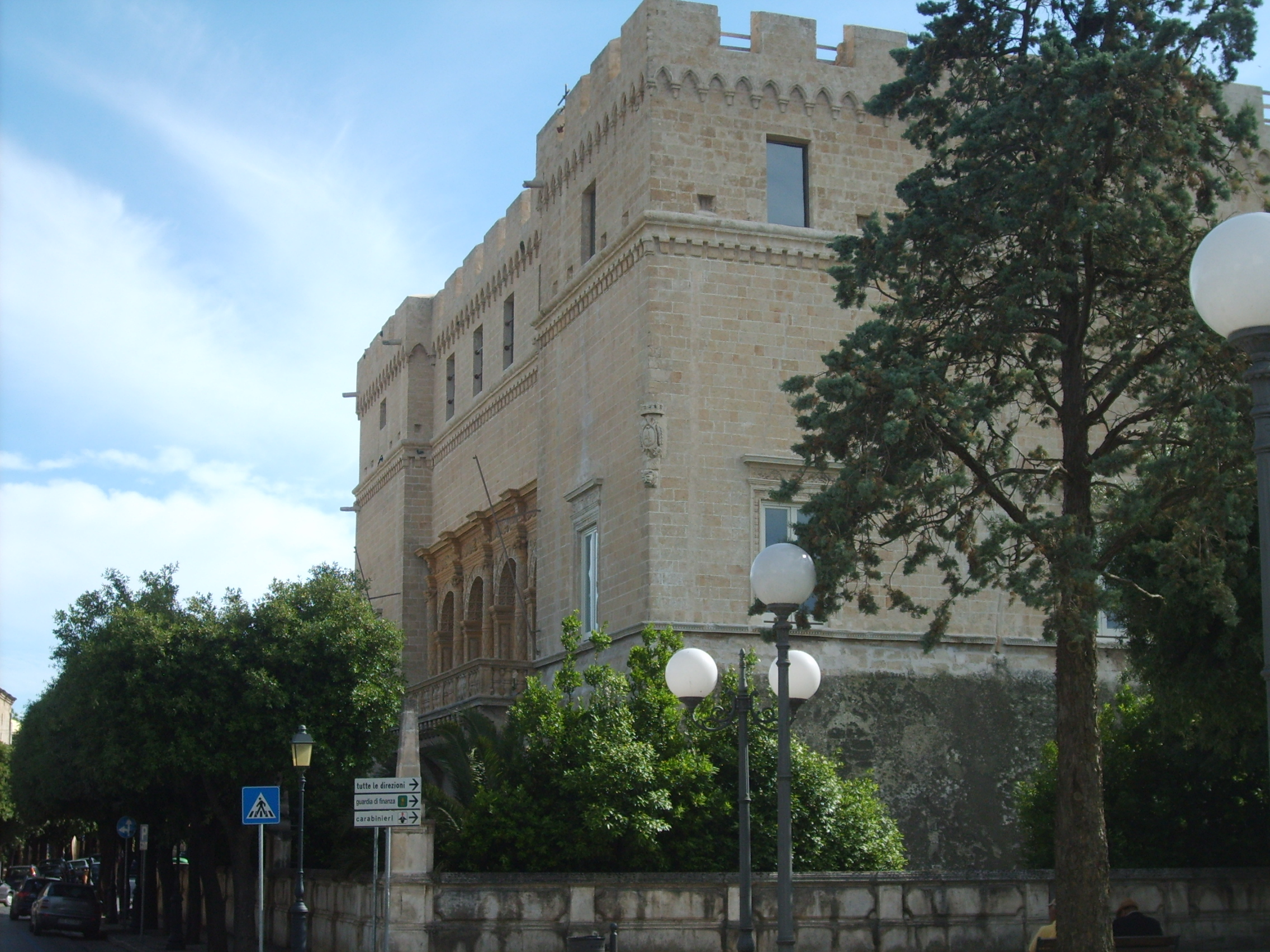 Scorcio del Castello Imperiali, a Francavilla Fontana.